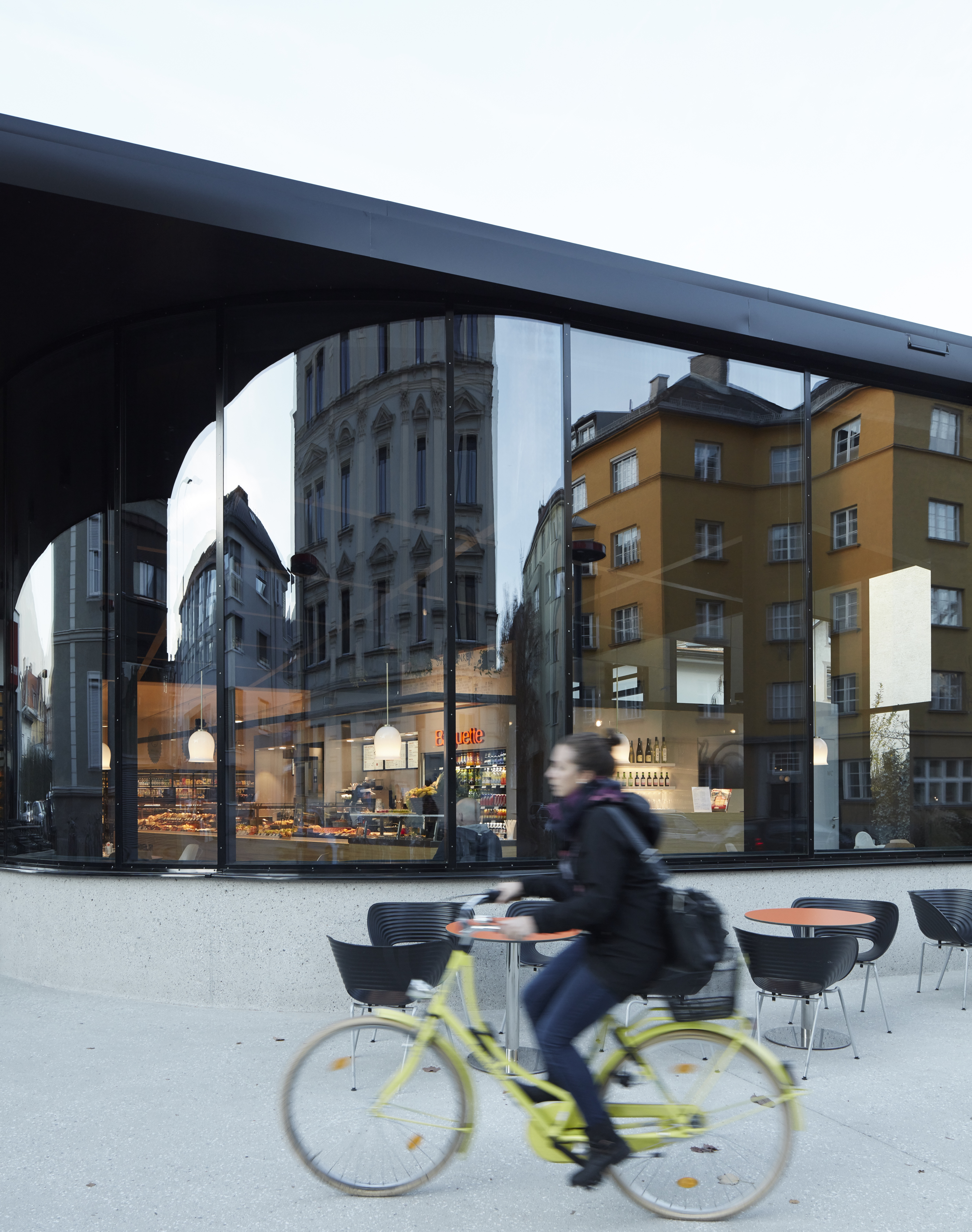 Der MPREIS Markt mit Glasfassade befindet sich nahe des Wiltener Platzls und wurde von Architekt Vogl-Fernheim entworfen